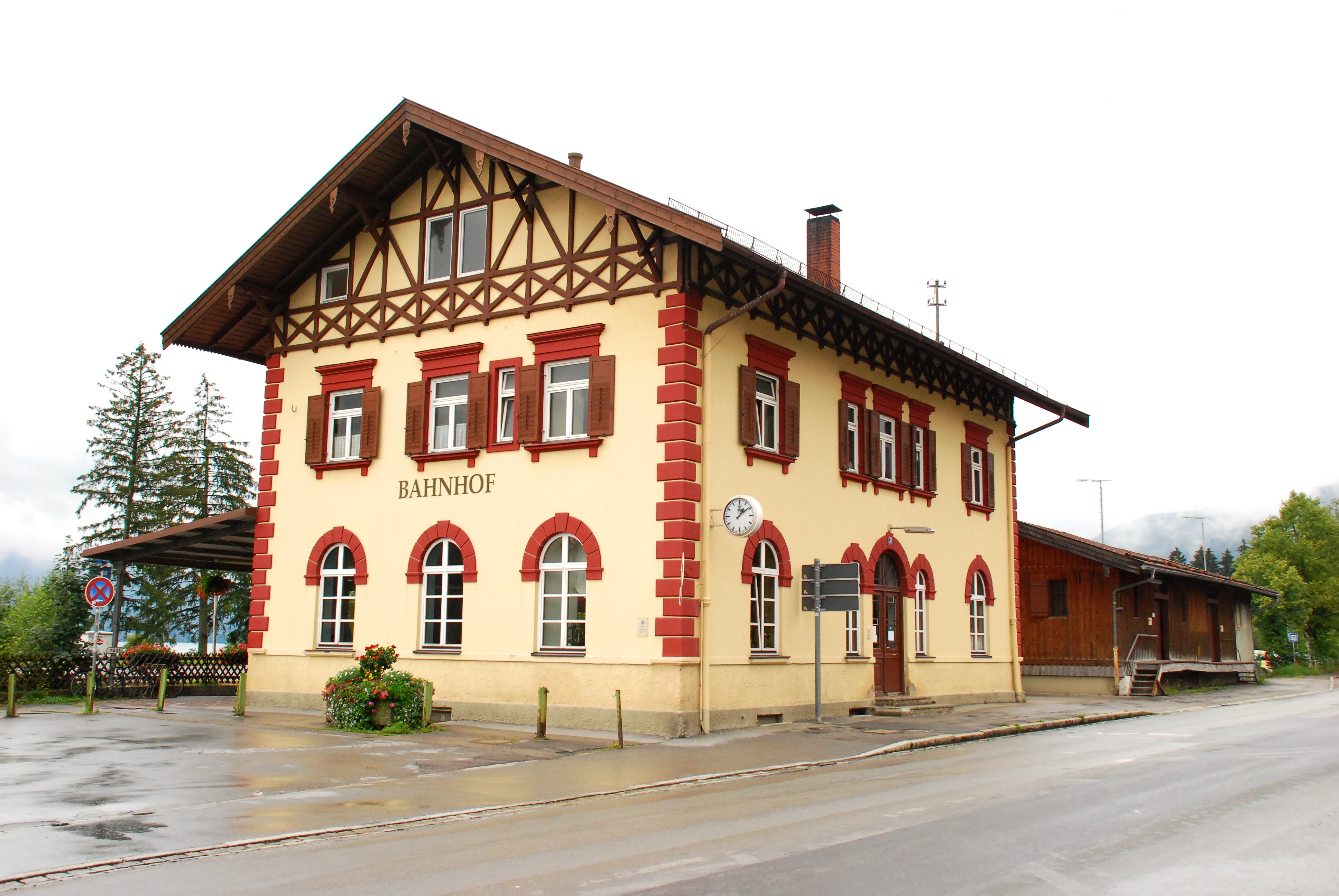 Bahnhof (Platzseite) in der Wiesseer Straße 11 in Gmund am Tegernsee, Landkreis Miesbach, Regierungsbezirk Oberbayern, Bayern. Als Baudenkmal in der Bayerischen Denkmalliste aufgeführt. Laut Gebäudetafel im Jahr 1883 erbaut.